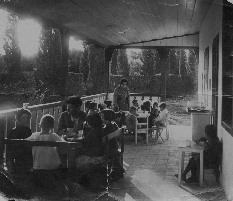 Miriam Singer 1